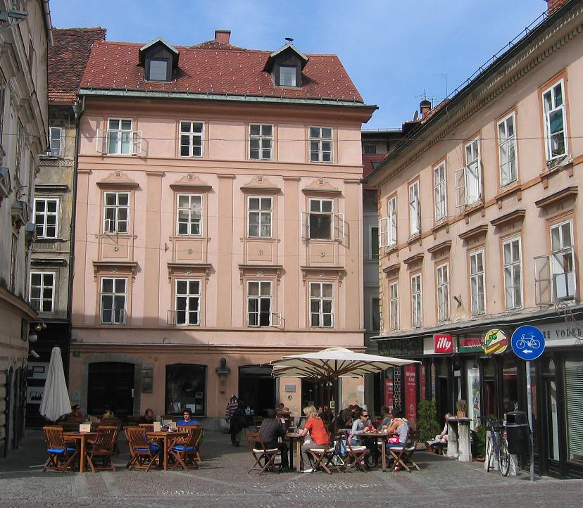 Jurčič square, Ljubljana photo:Ziga 21:38, 27 April 2006 (UTC)